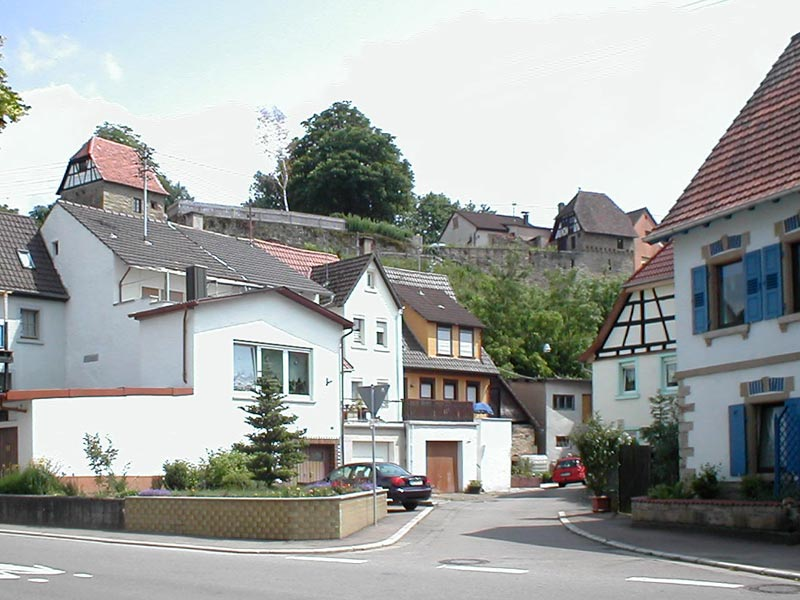 Mauerreste und Nebengebäude des Schlosses von Waldangelloch